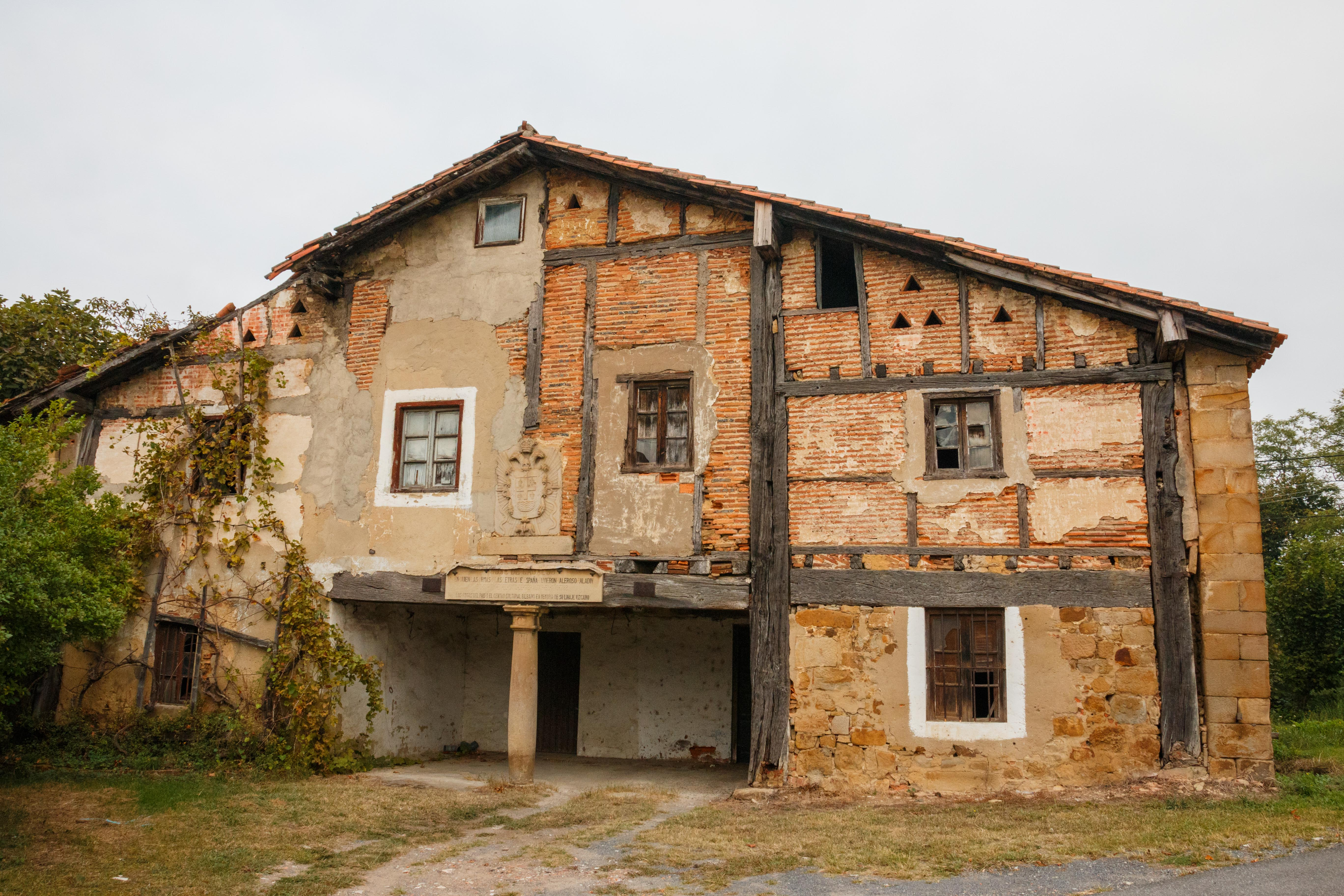 Cadalso baserria